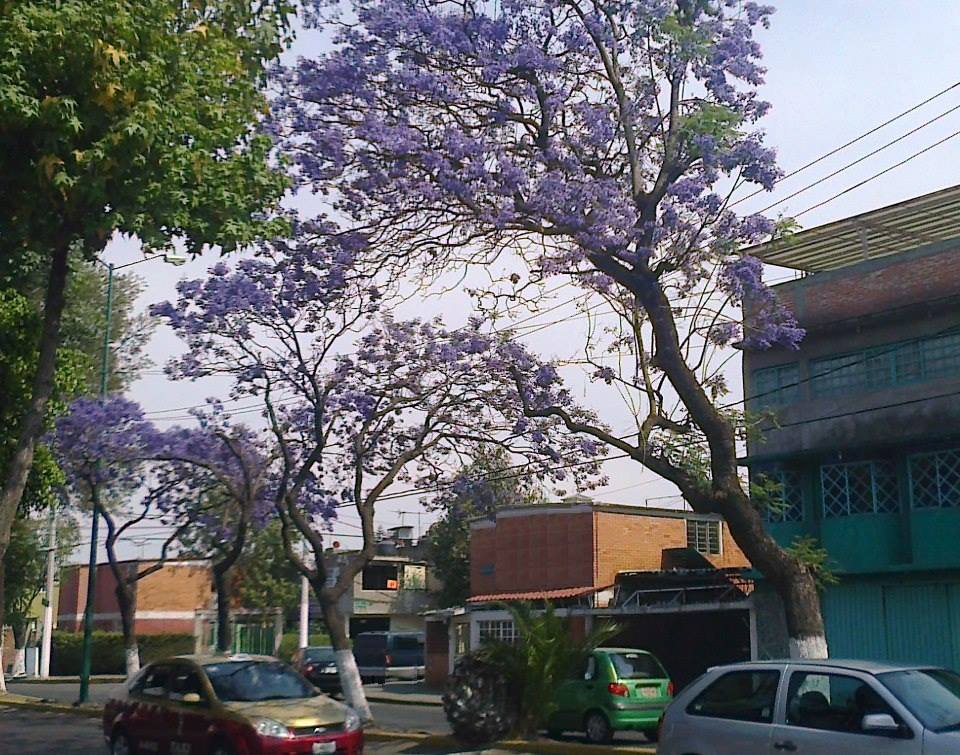 Jacarandas de Calle de la Dalia, Los Reyes Ixtacala.